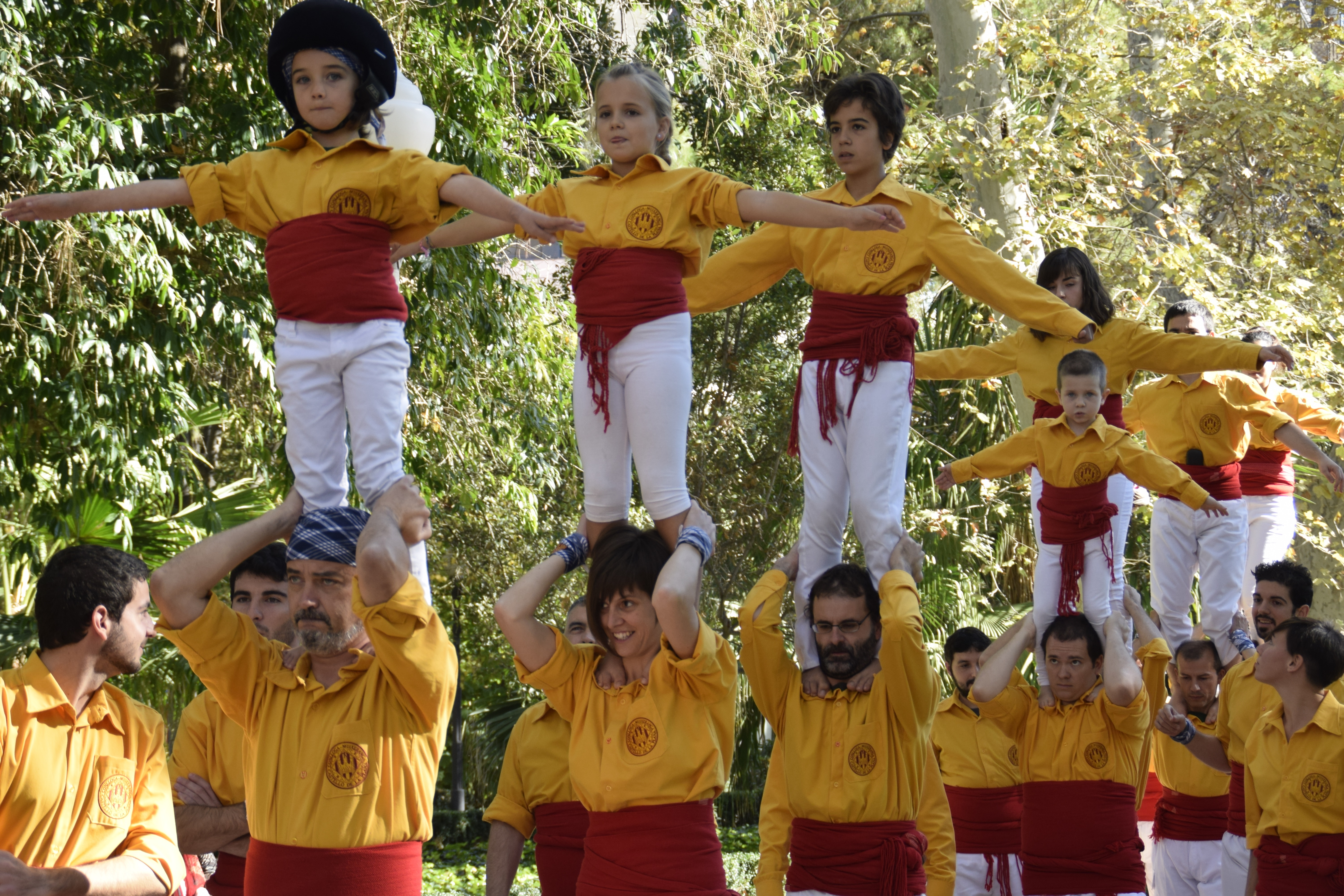 La Conlloga a la Fira del Xocolate de Castelló